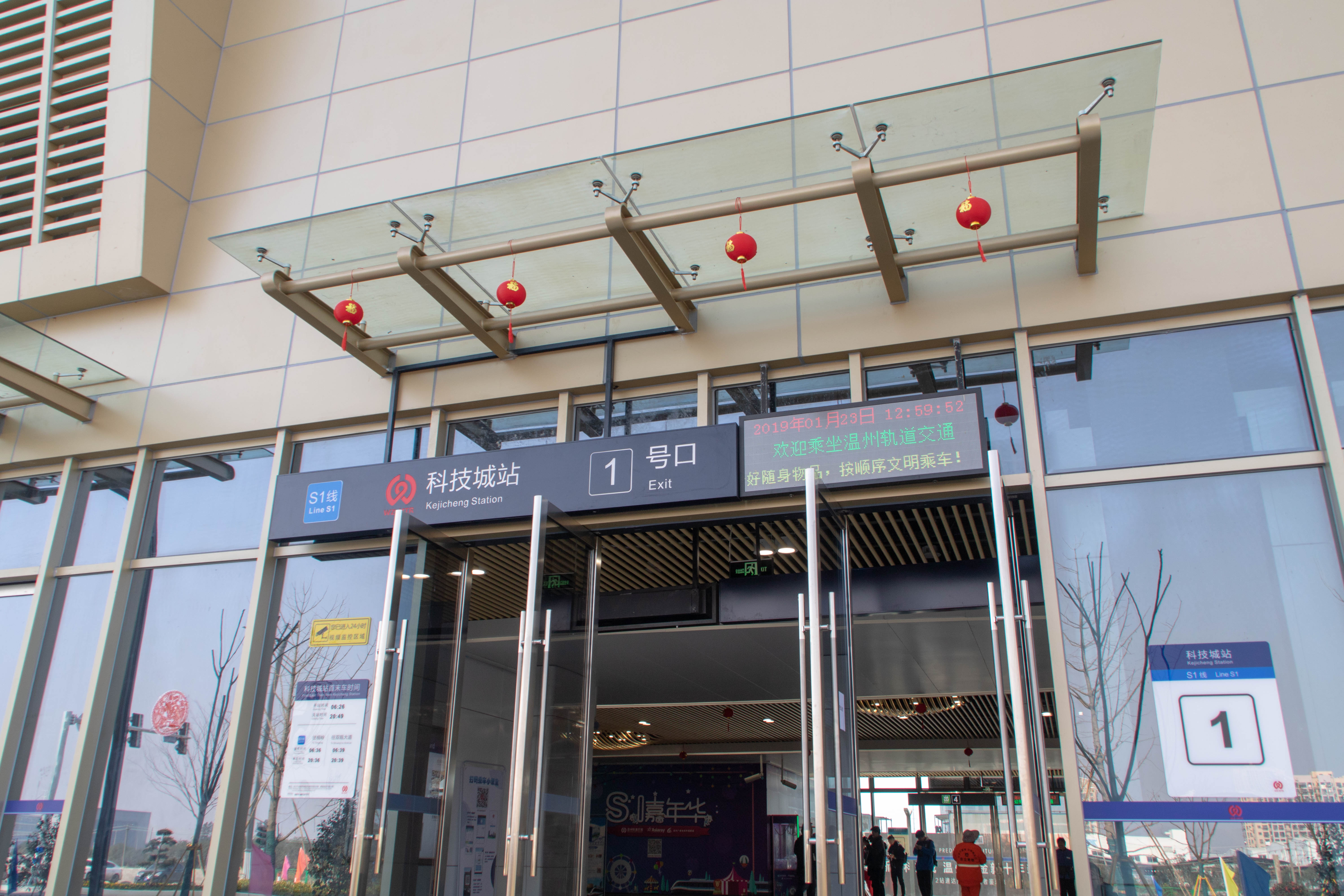 中文（中国大陆）: 科技城站1号出入口